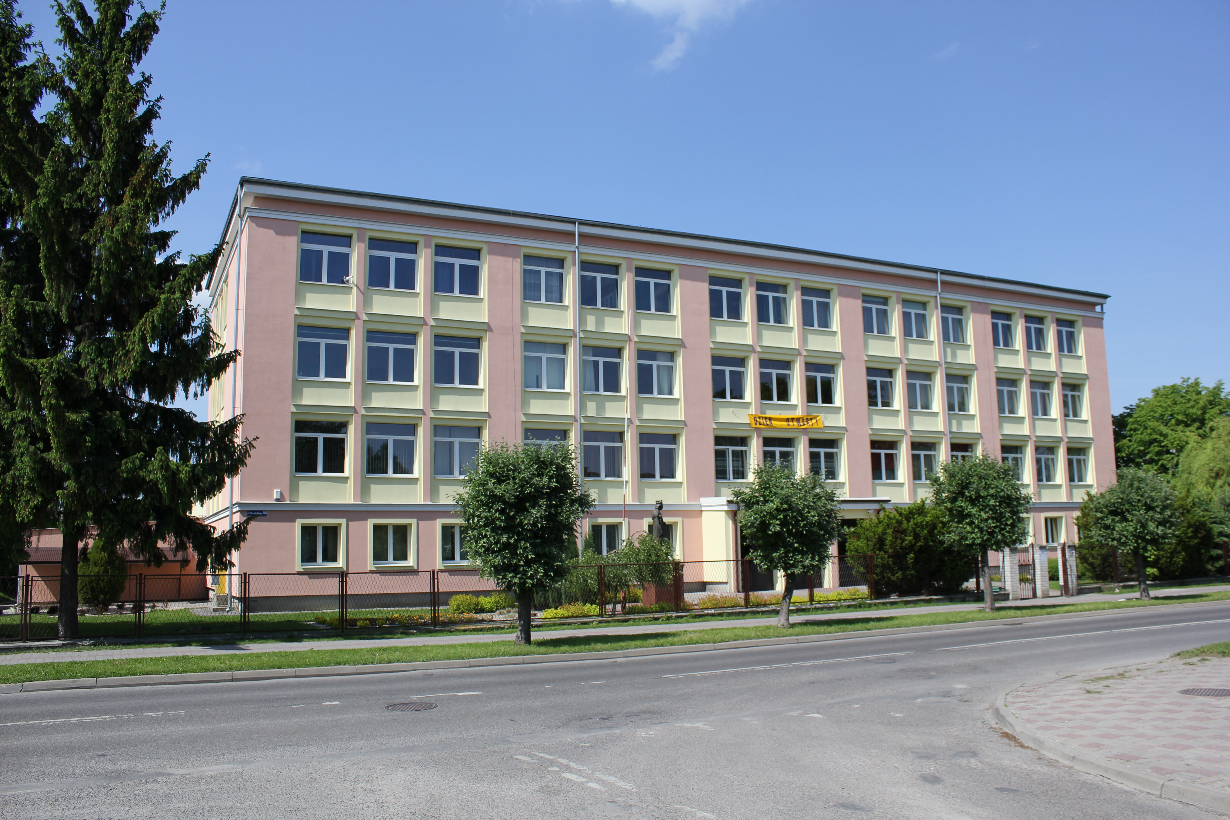 I LO im. Władysława Jagiełły